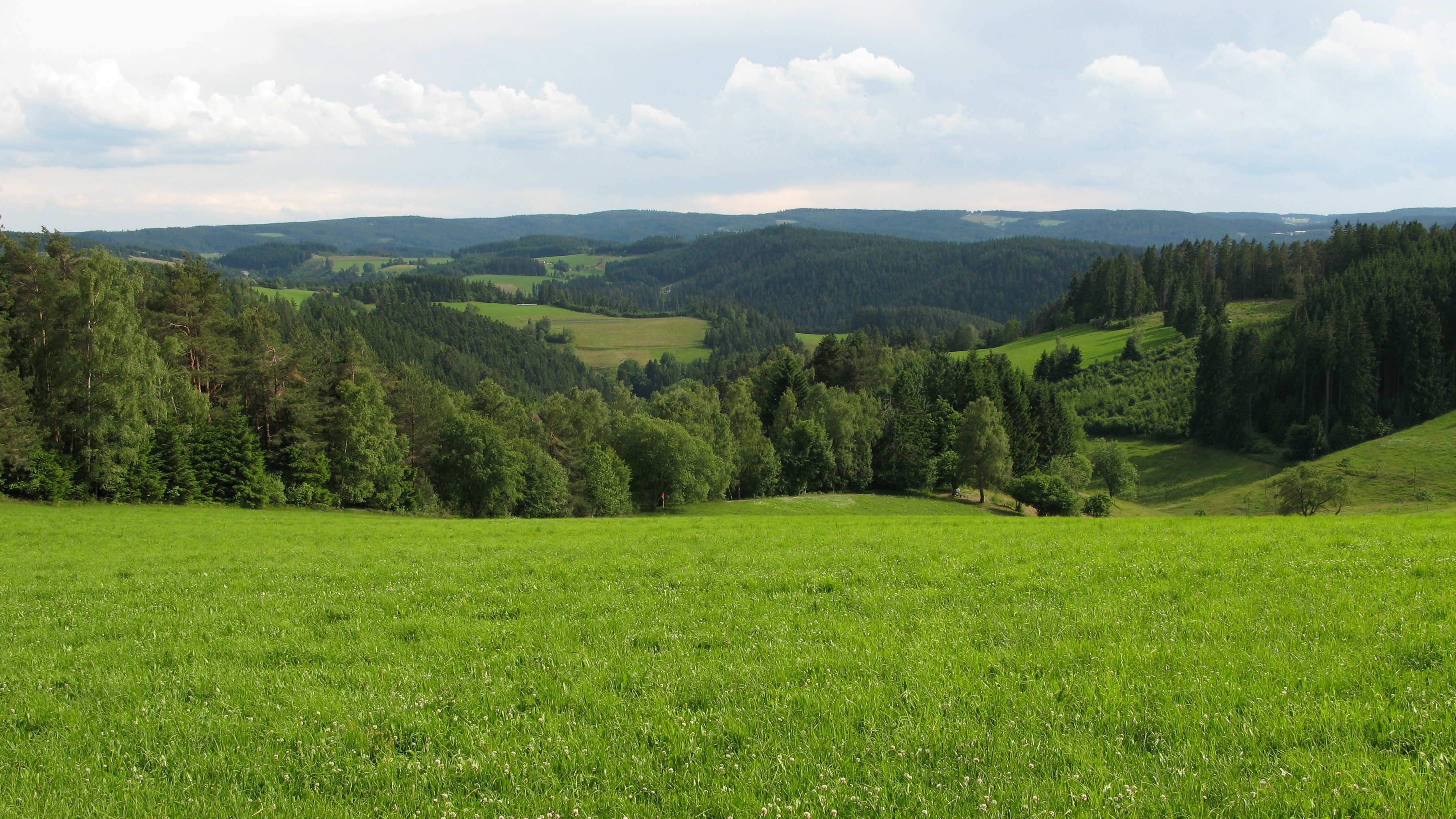 Blick nahe der Obersteighöhe in der Nähe der Hornberger Höhe am Schwarzwald-Querweg Rottweil–Lahr im Schwarzwald.